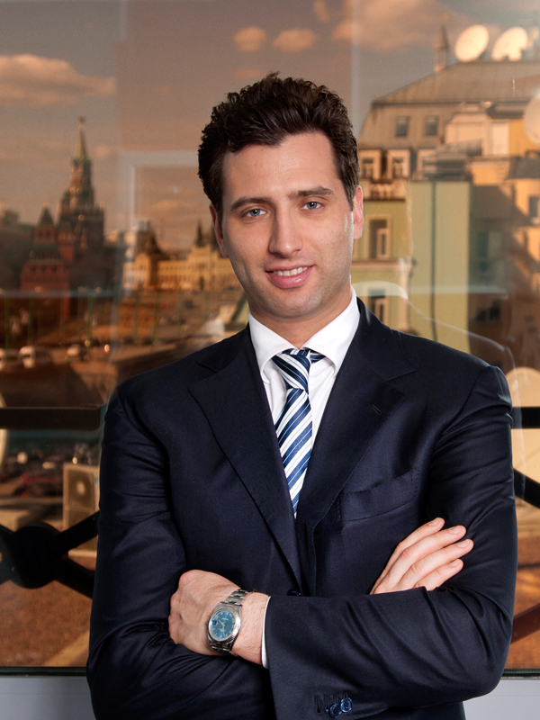 Роман Борисович Ротенберг